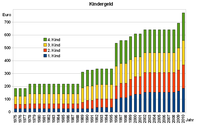 Entwicklung des Kindergeldes in Deutschland